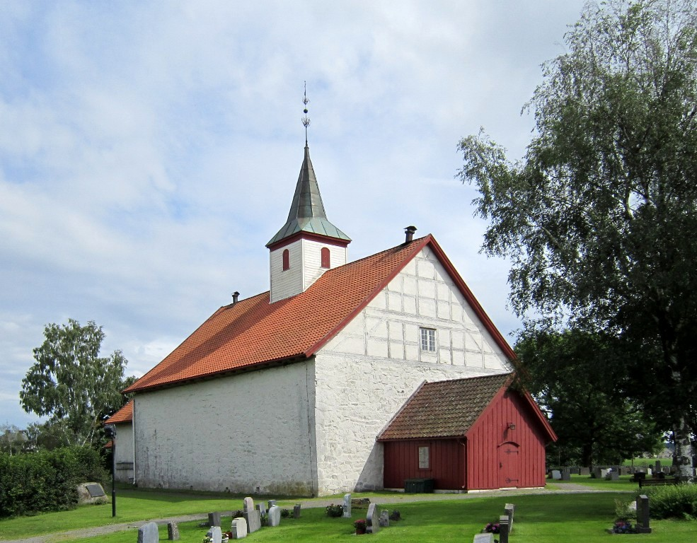 Ramnes kirke, Vestfold